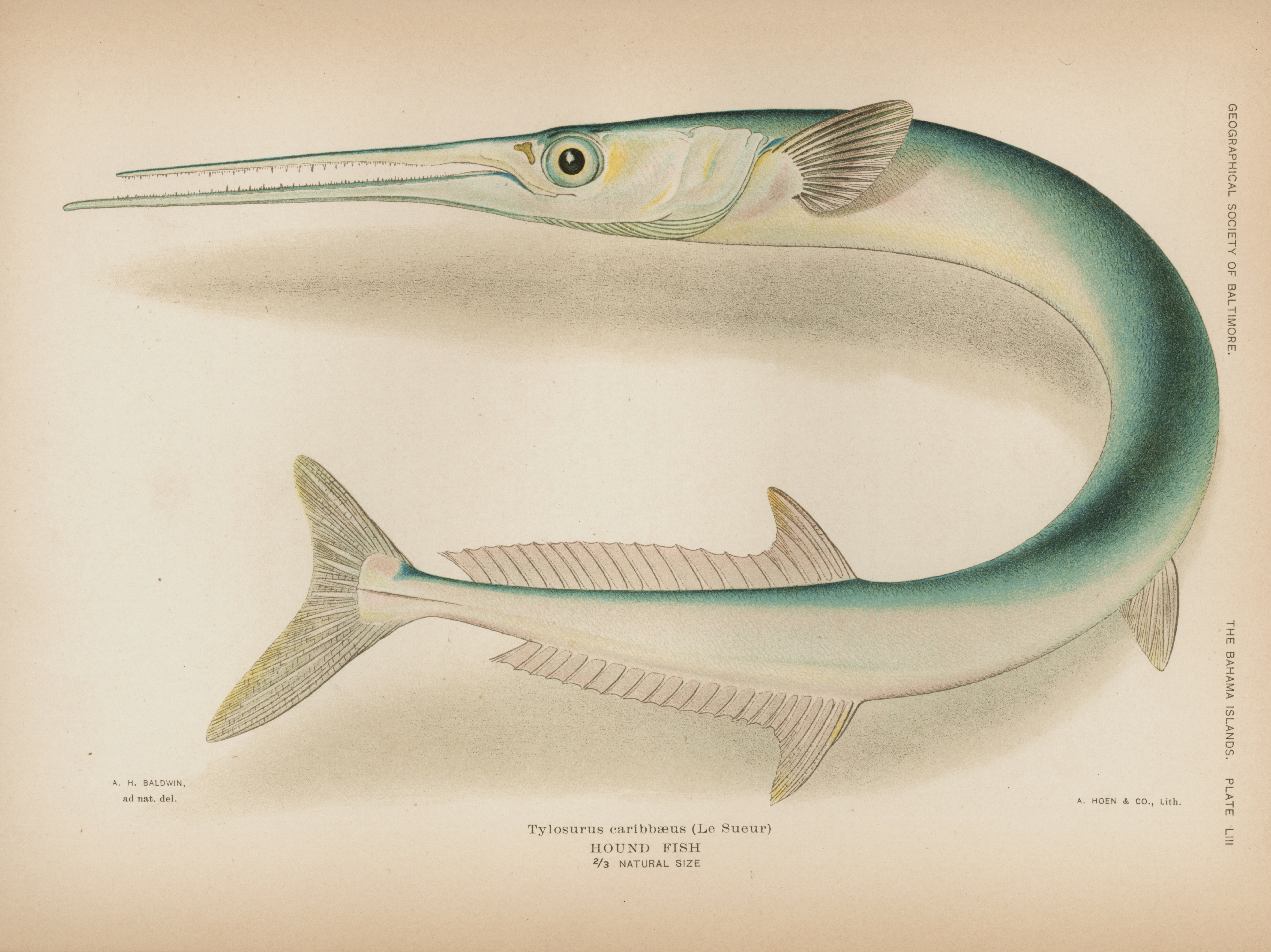 Tylosurus crocodilus